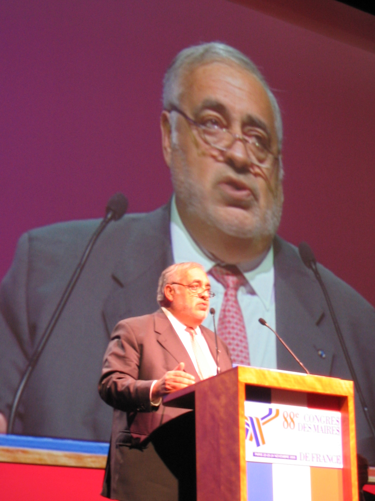 Philippe Séguin, président de la Cour des Comptes, au 88ème Congrès des Maires de France